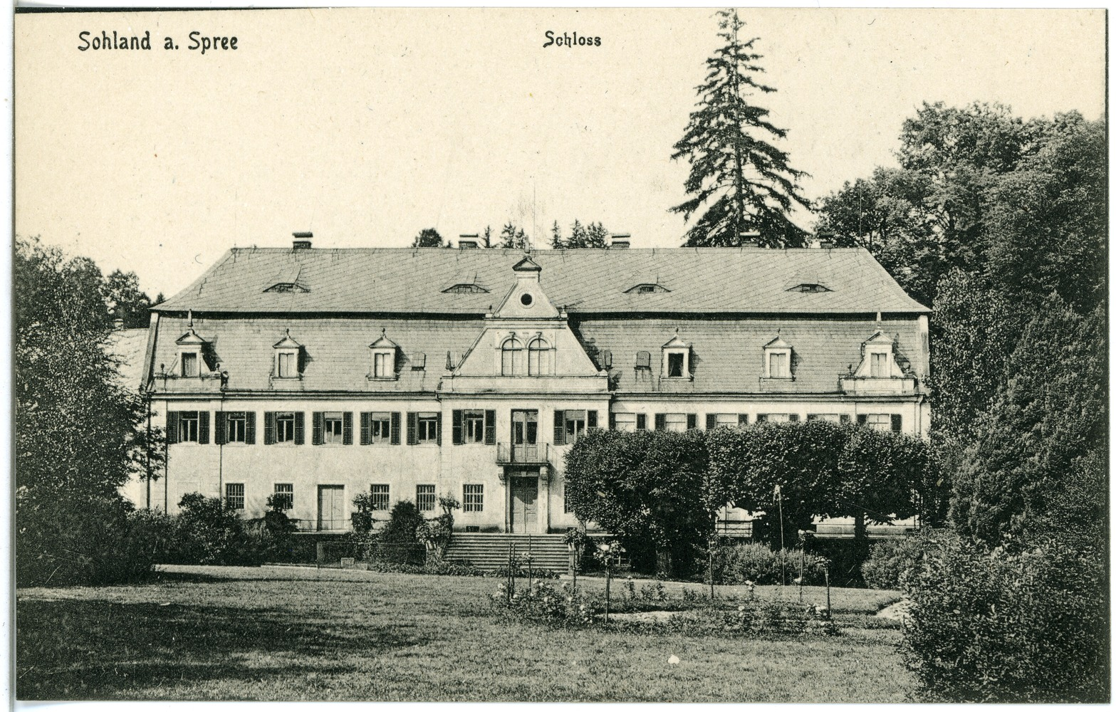 Sohland; Schloß This postcard is from publisher Brück & Sohn in Meißen ( postcard has a unique number 19508 and is available in a higher resolution at the publisher. This images was uploaded in a cooperation project between Wikipedians and the publisher.